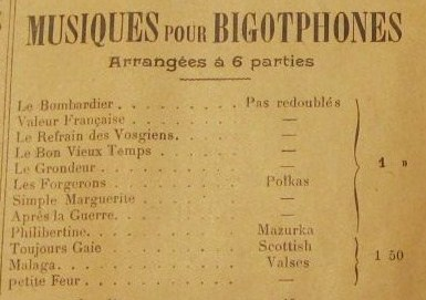 Catalogue de musiques pour bigophones vers 1900.